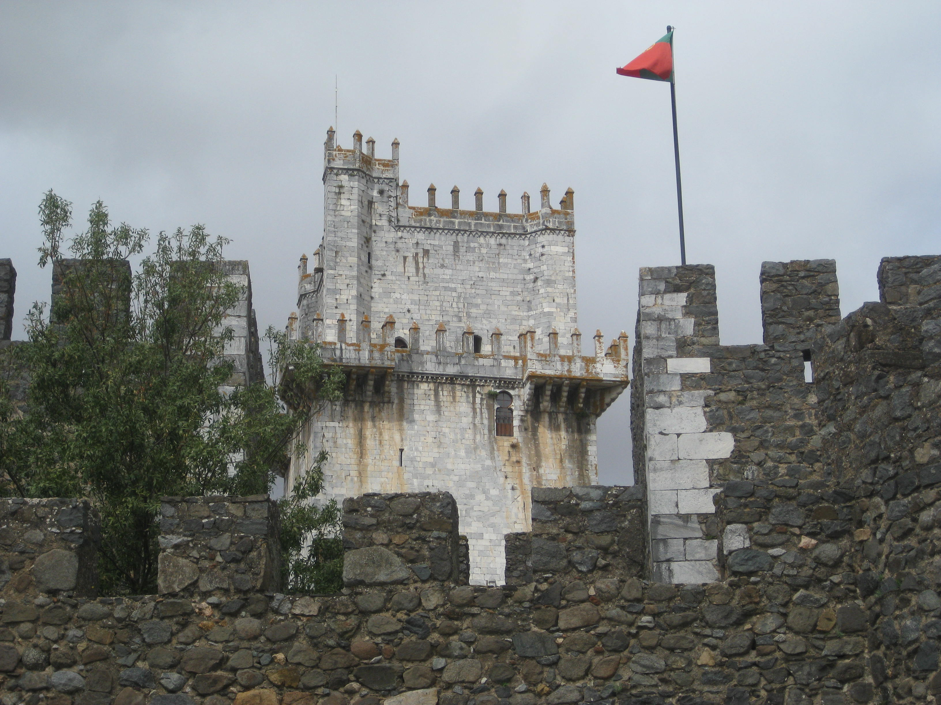 Castello - Beja 2011